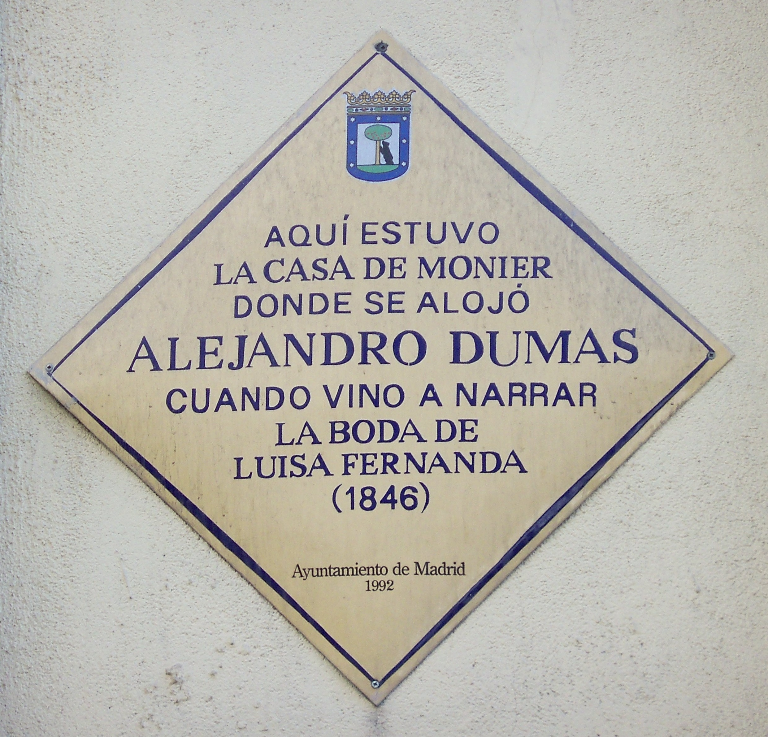 Recuerdo del paso de Alexandre Dumas en Madrid - Carrera de San Jerónimo, 10.